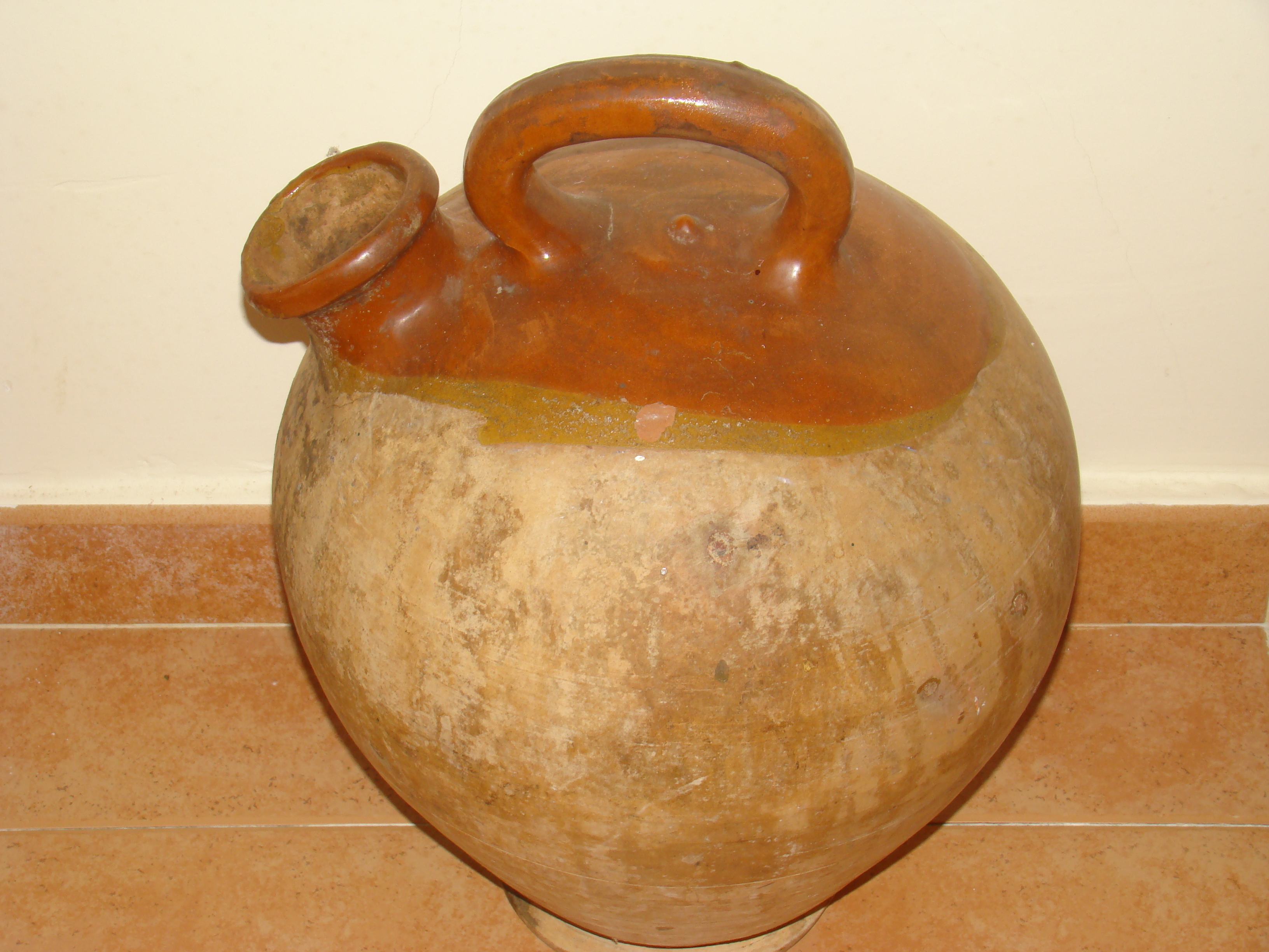 'Càntir d'oli' (o 'càntir per oli'), botijo para aceite, aceitera de barro o cantarilla para aceite, es una pieza tradicional de la alfarería catalana, documentada desde la Edad Media. Pieza del Museo del cántaro en la localidad de Valoria la Buena, en la provincia de Valladolid, España.